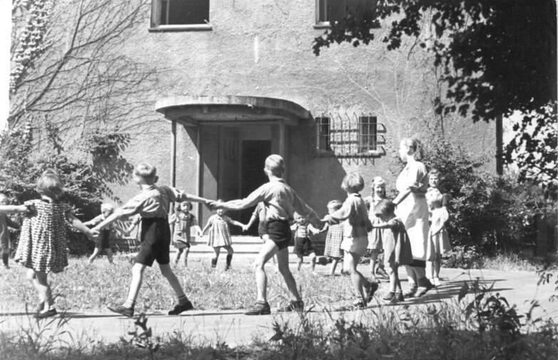 Magdeburg-Friedensweiler, Blick vor einen Kindergarten Zentralbild Biscan 14.7.1953 Ein Kindergarten für die Kinder von Genossenschaftsbauern Entsprechend den Vorschlägen des Politbüros der Sozialistischen Einheitspartei Deutschlands hat die Regierung zusätzliche 40 Millionen DM für Kindergärten, Feierabendheime, Ferienheime zur Verfügung gestellt. Zu den in der letzten Zeit neuerrichteten Kindergärten gehört die Kindertagsstätte in Magdeburg-Friedensweiler, die hauptsächlich für die Kinder der Mitglieder der Landwirtschaftlichen Produktionsgenossenschaft Friedensweiler und der Arbeiter des Karl-Marx-Werkes gedacht ist. Dieser neue Kindergarten nimmt besonders den Genossenschaftsbäuerinnen während der Erntezeit manche Arbeit ab. UBz: "Es geht eine Zipfelmütze in unserem Kreis herum..."-ein fröhliches Kreisspiel im neuerrichteten Kindergarten Magdeburg-Friedensweiler.